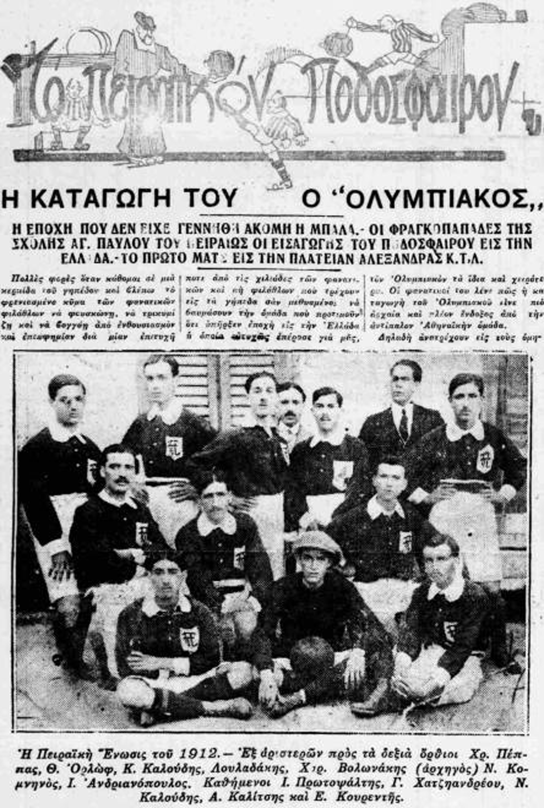 Η ομάδα της Πειραϊκής Ένωσης το 1912. Θ. Ορλώφ, Κ, Καλούδης, Λουλαδάκης, Χαρ. Βολωνάκης, Ν. Κομνηνός, Γιάννης Ανδριανόπουλος Ι. Πρωτοψάλτης, Γ. Χατζηανδρέου, Ν. Καλούδης, Α. Καλίτσης, Ε. Κουρέντης